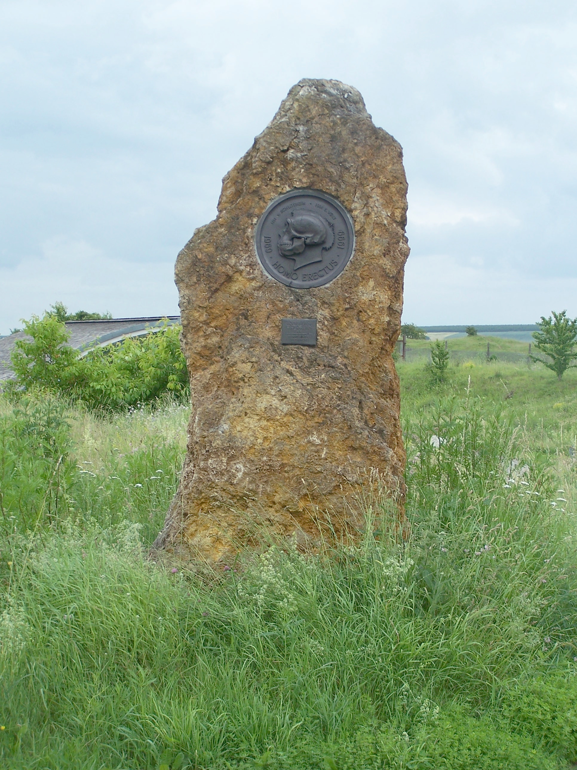 Das Denkmal am Museum Bilzingsleben erinnert seit 1999 an die Entdeckung von Resten des Homo erectus.